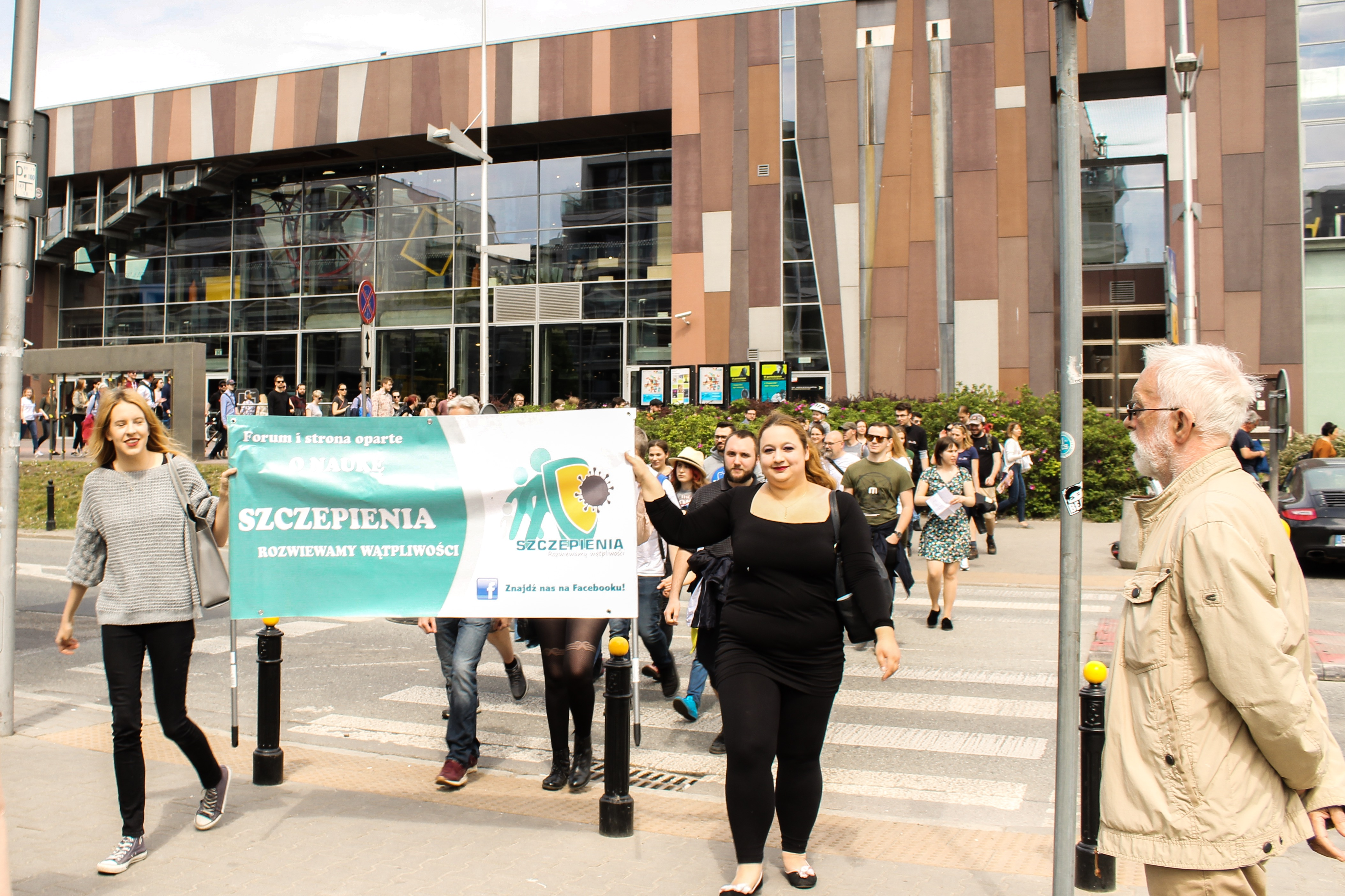 permission=